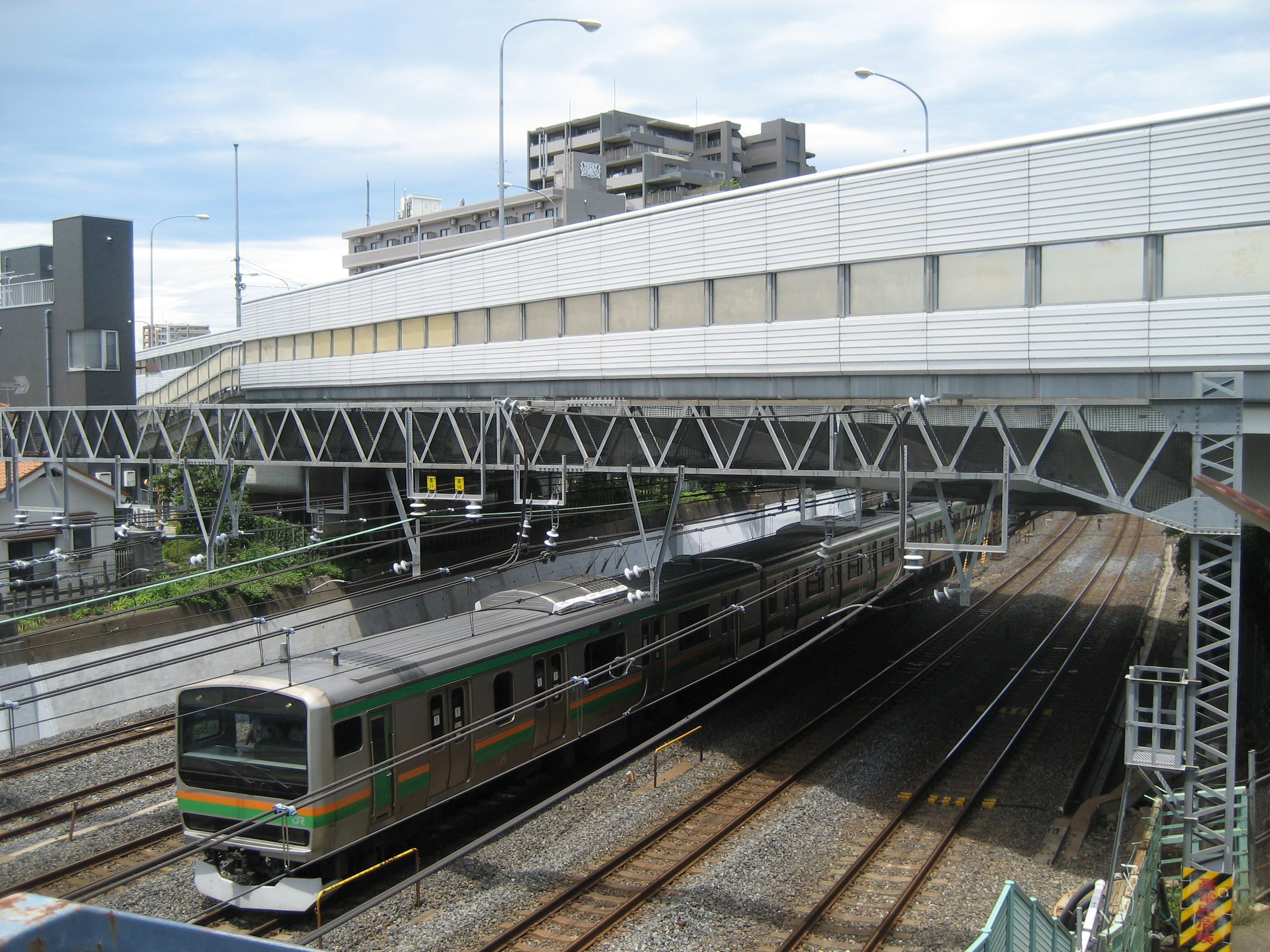 国道４６３号線新浦和橋（JR線との交差している様子を撮影）